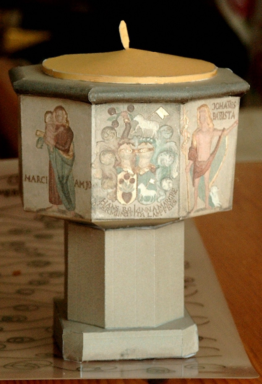 St. Martinskirche (Seelze), Modell des Taufsteins